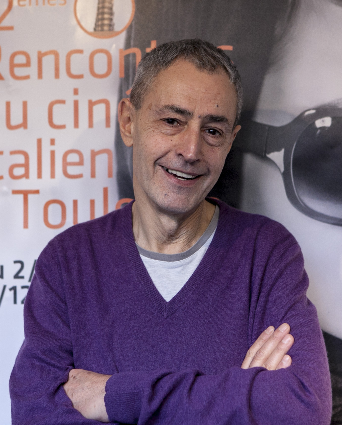 David Grieco - réalisateur de « La macchinazione »